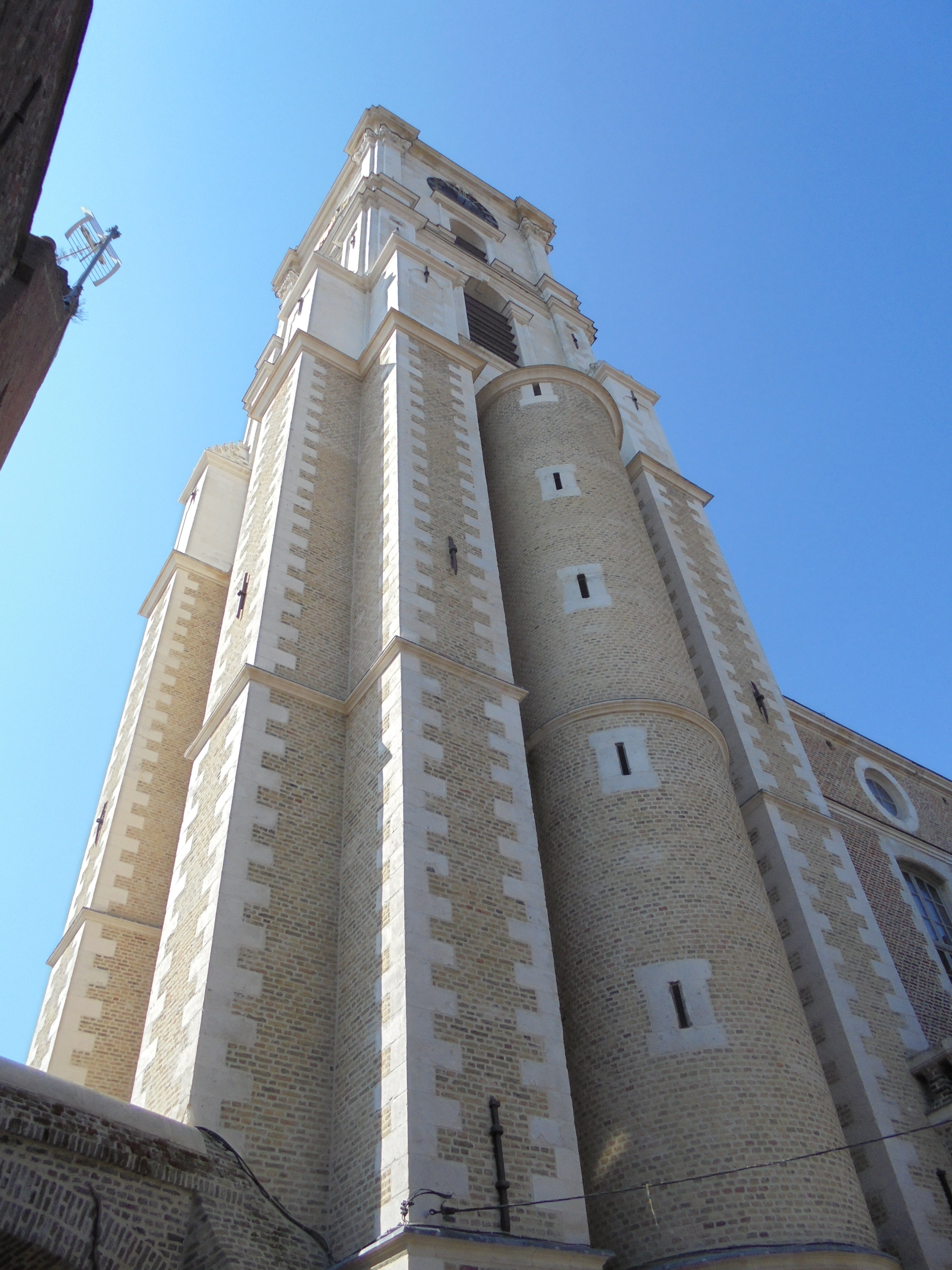 Het Belfort - Aire-sur-la-Lys - canton Aire-sur-La-Lys - arrondissement Saint-Omer - département Pas-de-Calais - région Hauts-de-France - France